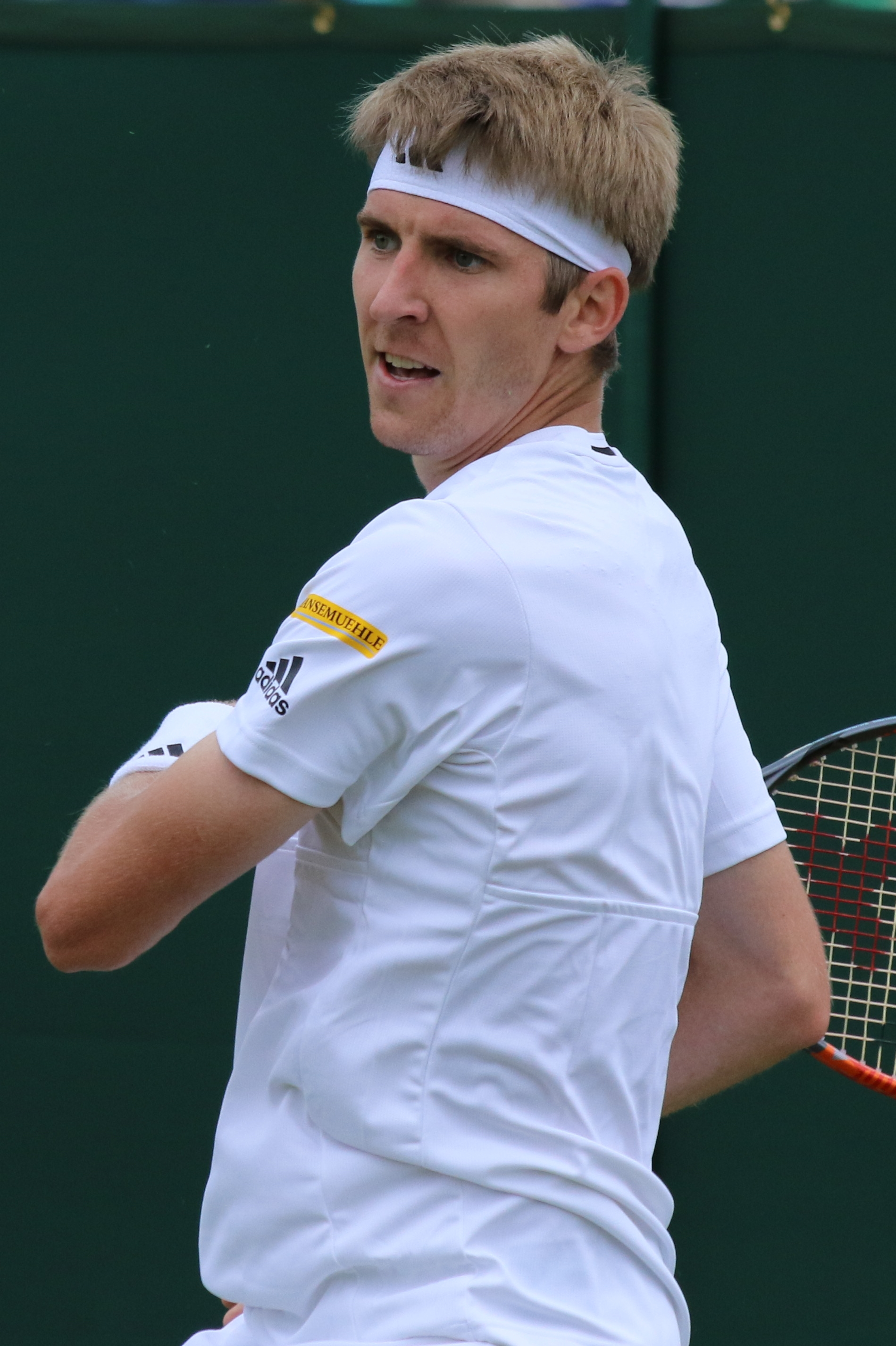 Stebe WMQ16 (17)